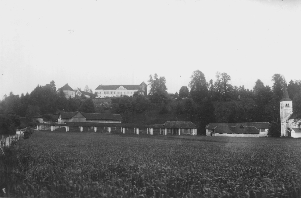 Grad Boštanj